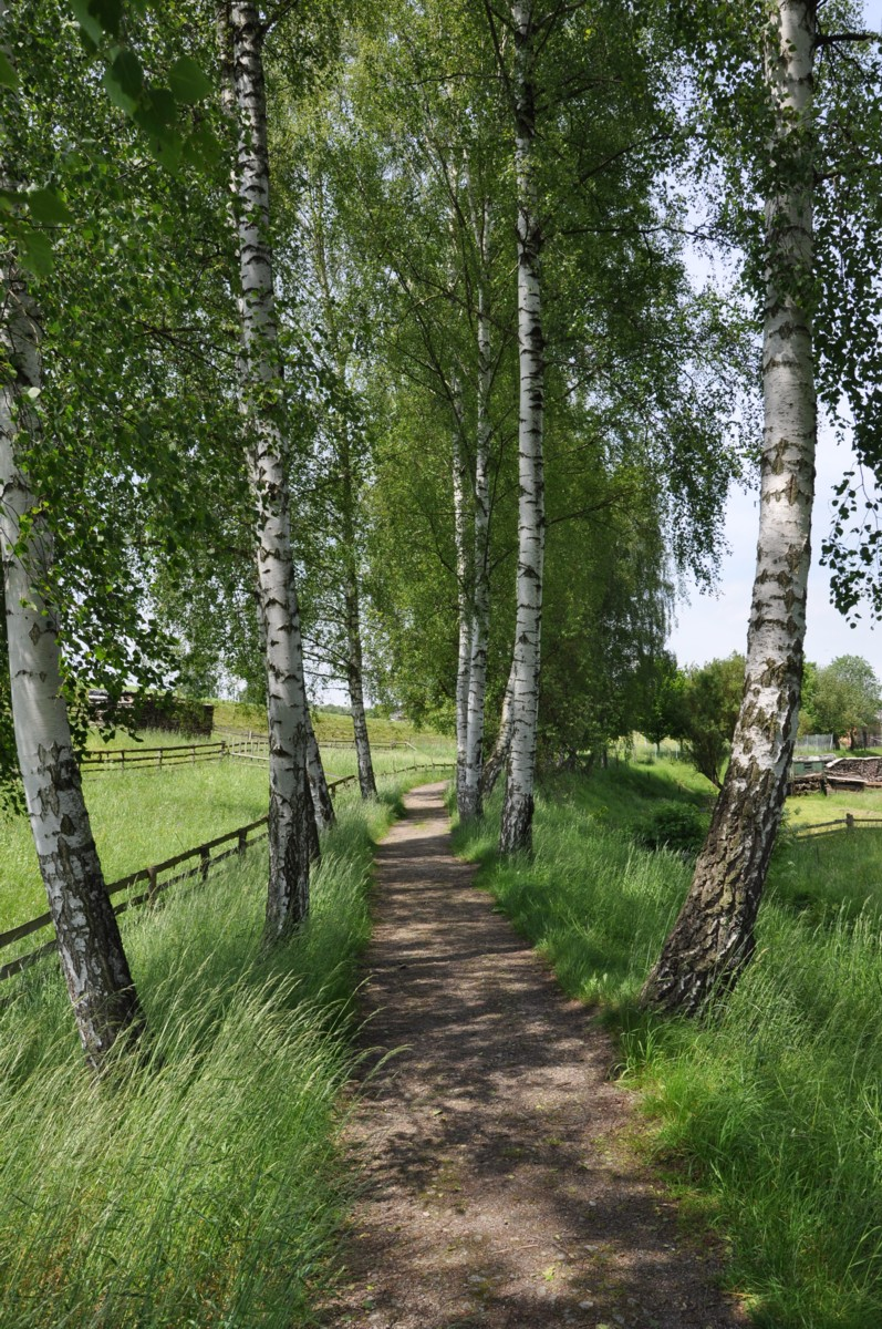 Trasse der ehemaligen Schwarzbachbahn bei Lohsdorf